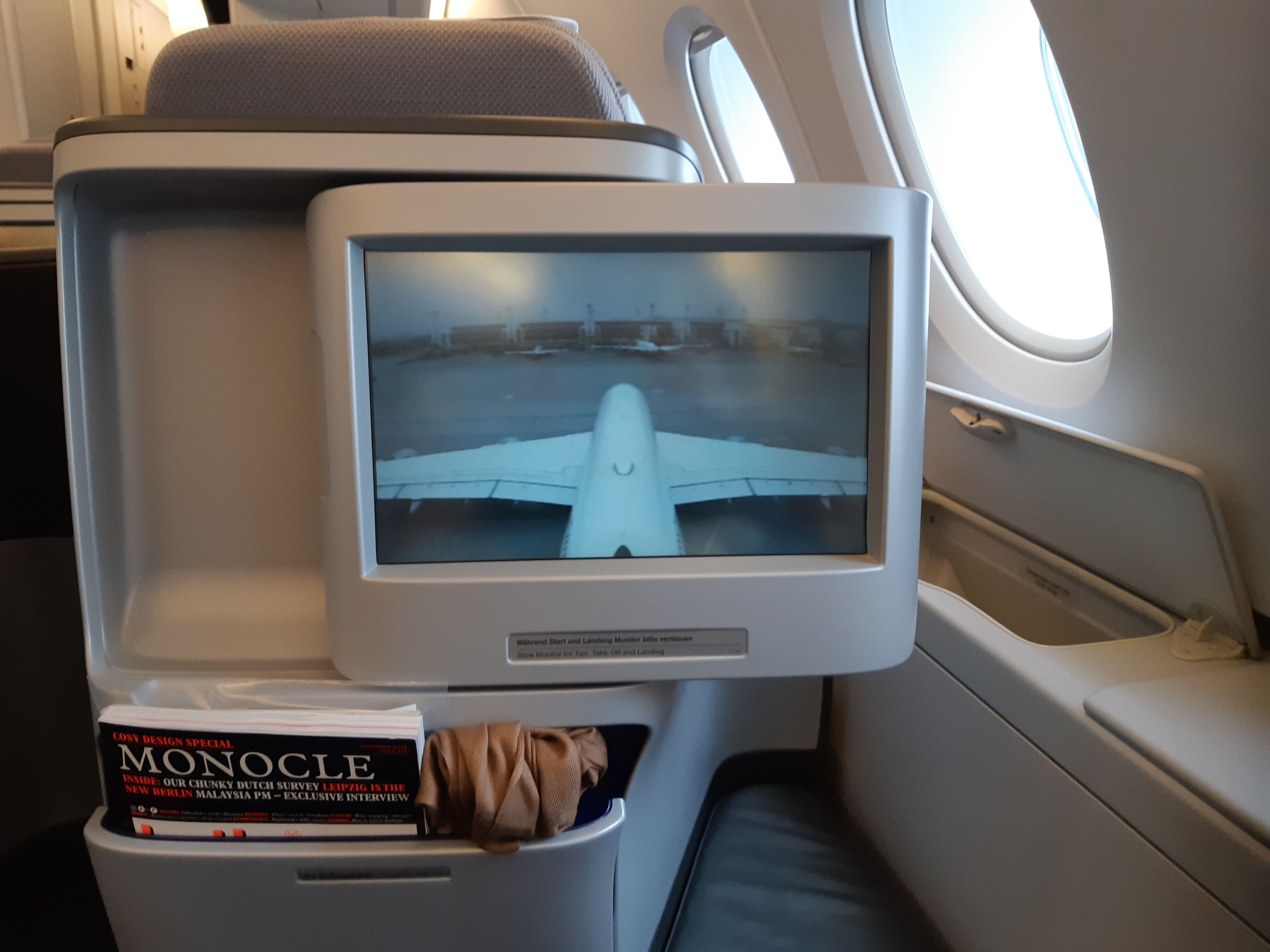 A380 Screen business class Lufthansa Ansicht Heckkamera